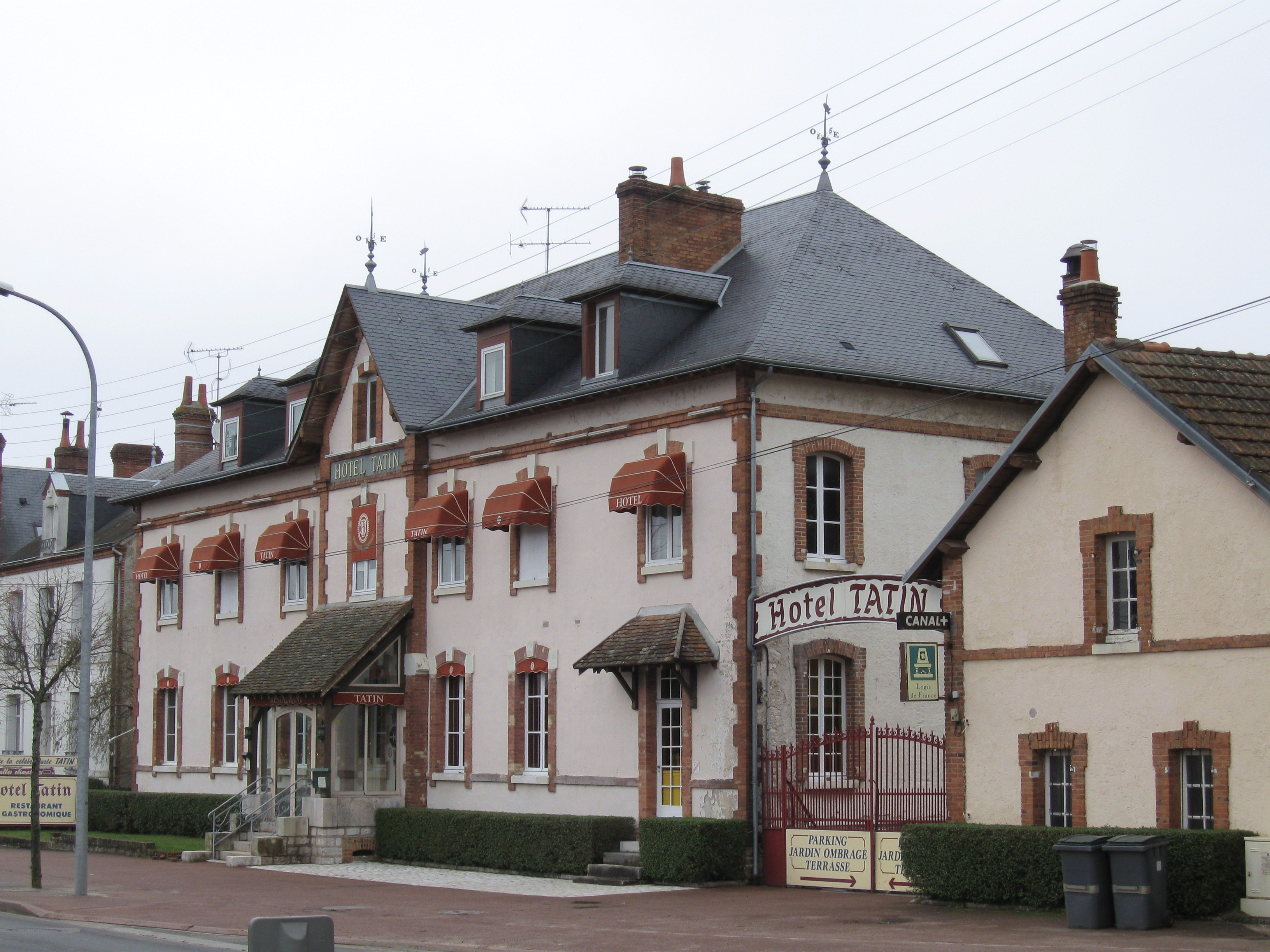 Hôtel-restaurant Tatin, Lamotte-Beuvron, Loir-et-Cher, France